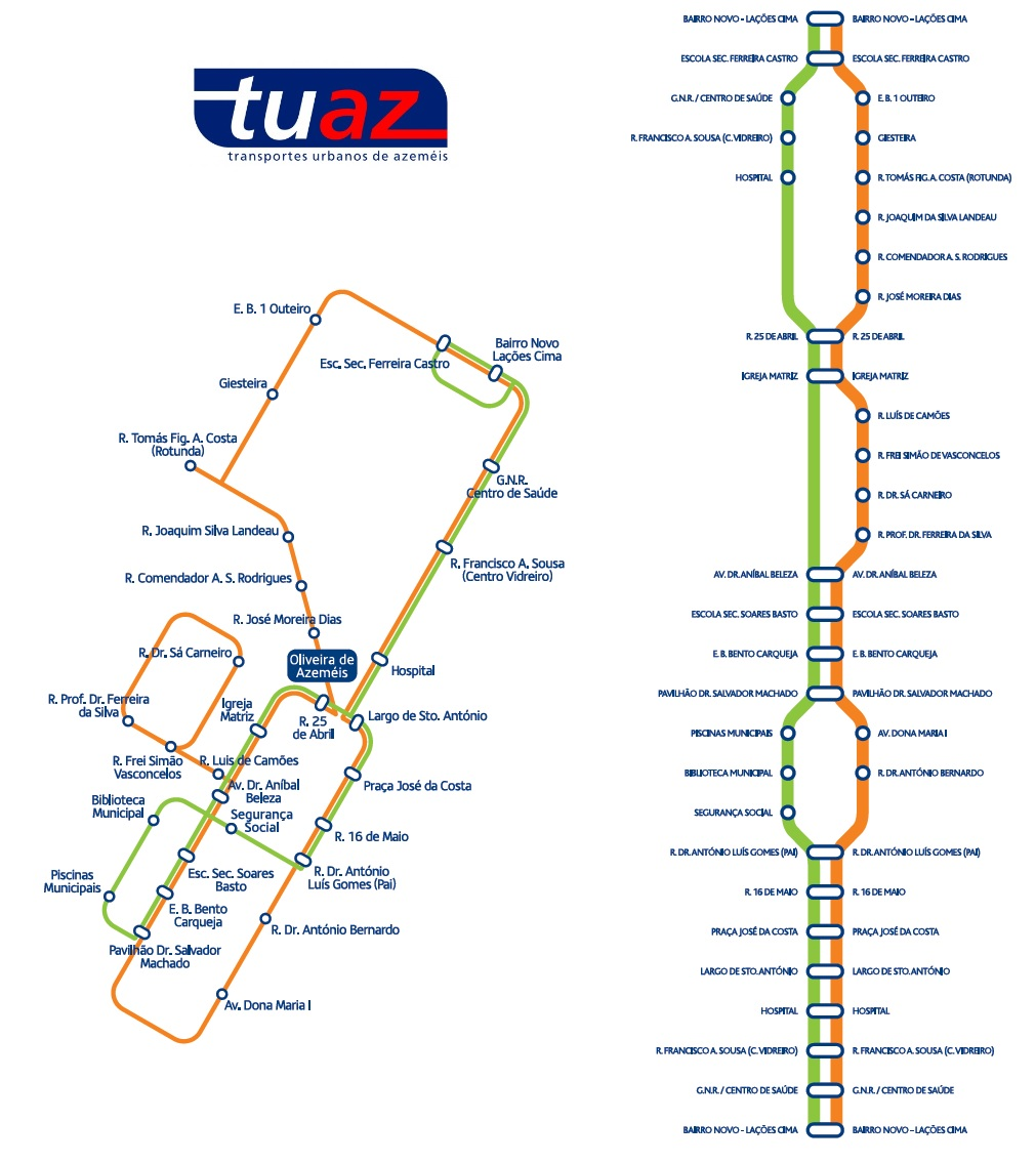 Linhas urbanas TUAZ - Oliveira de Azeméis